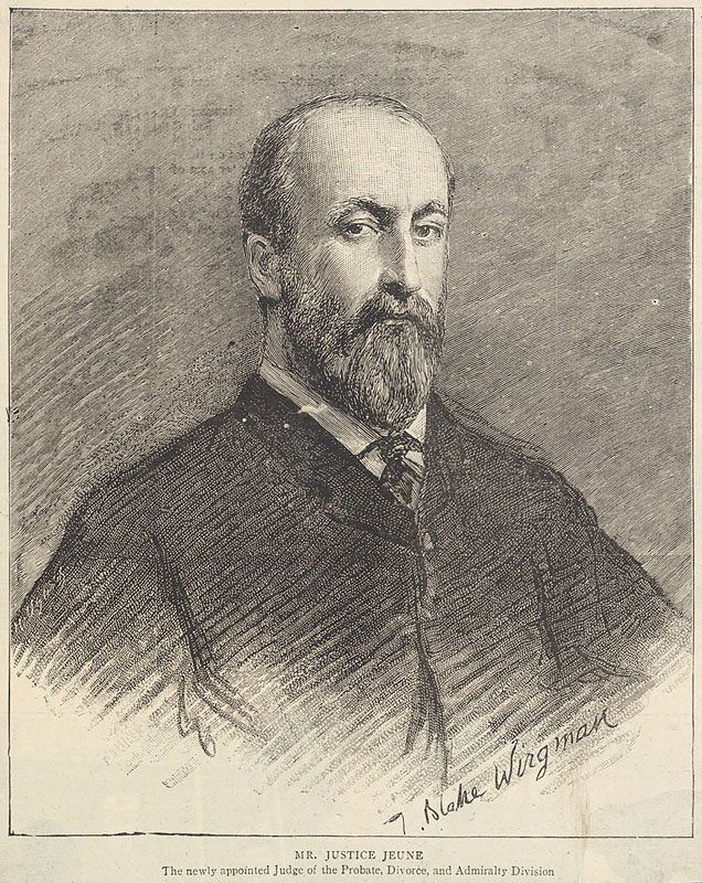 Portrait of Francis Jeune, 1st Baron St Helier (1843-1905)